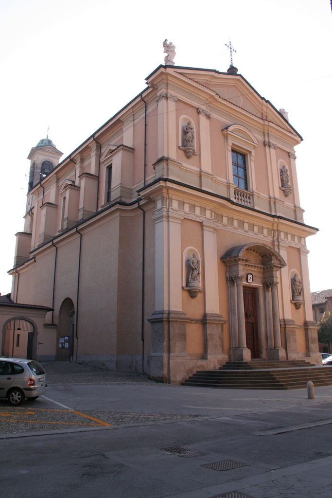 Autore Giorces. Arcene, la Parrocchiale